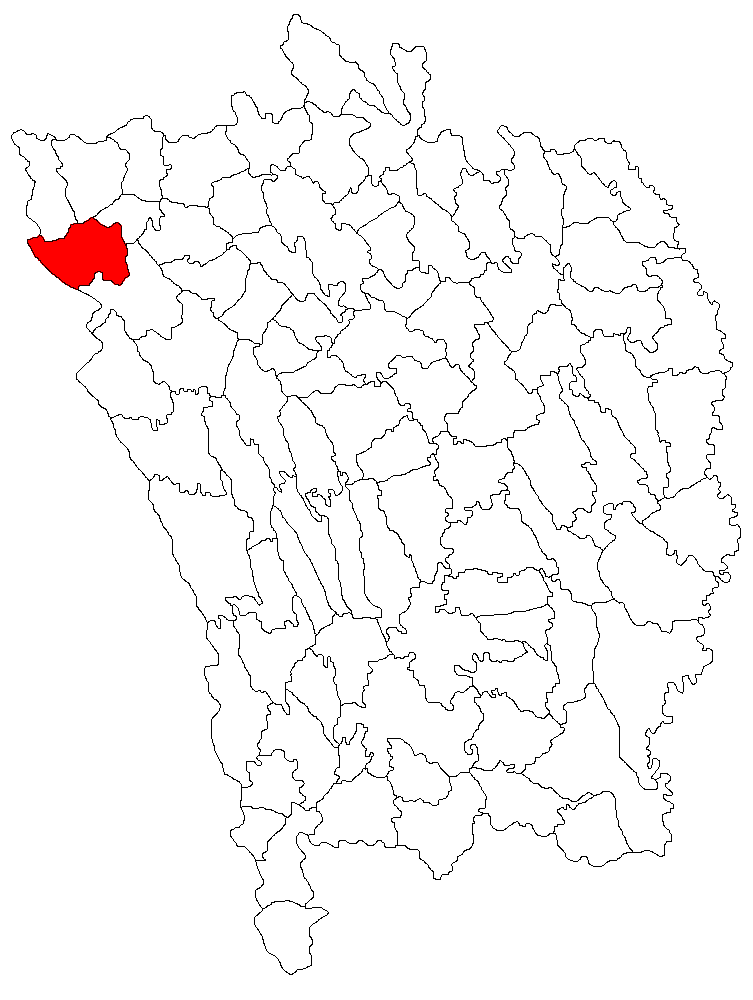 Categorie:Hărţi ale judeţului Vaslui